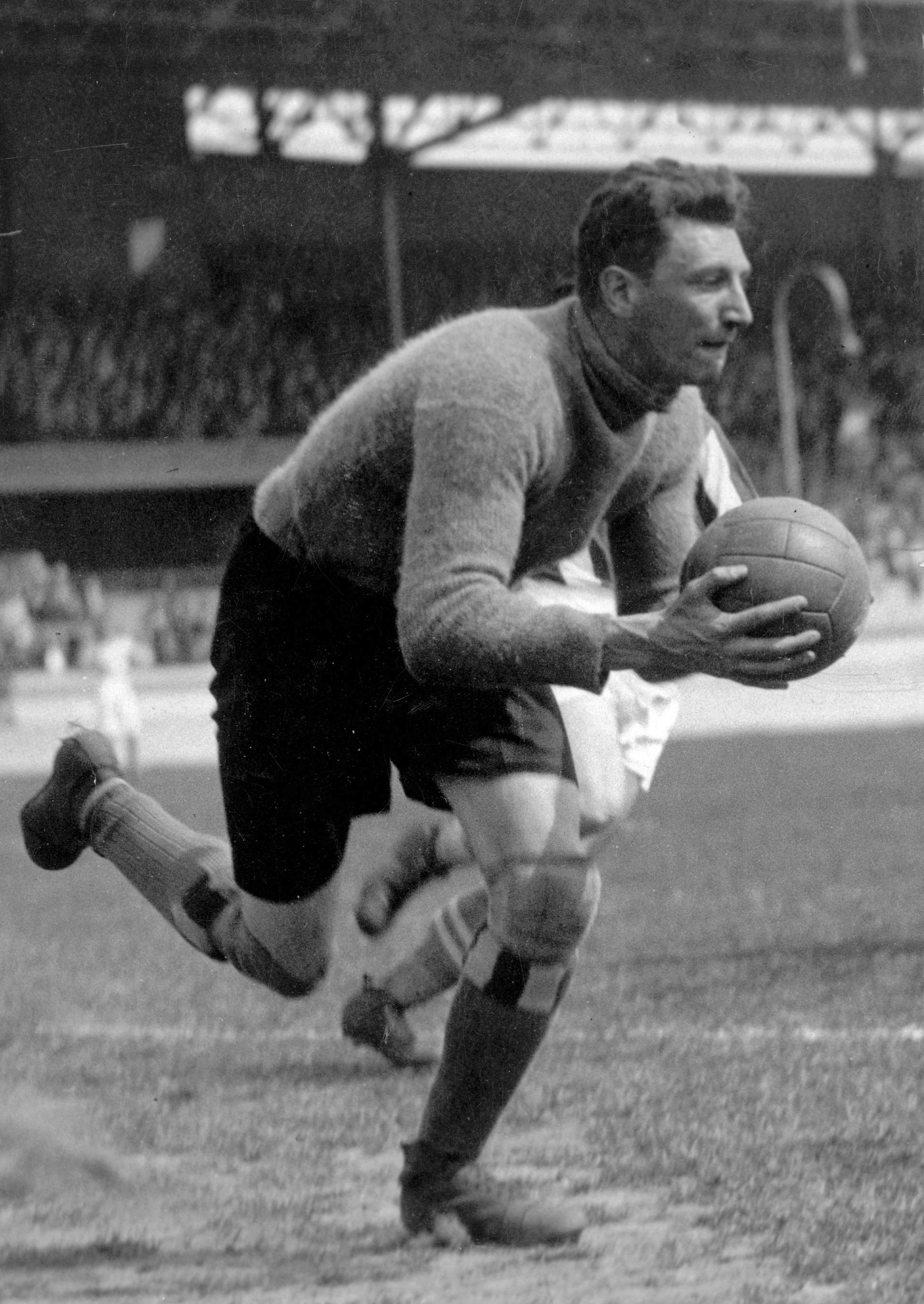 Ageaus IJme (Gejus) van der Meulen [1903 - 1972] Nederlands voetbalkeeper. Foto vermoedelijk uit 1928 tijdens de voetbalwedstrijd Nederland - Tsjecho-Slowakije.